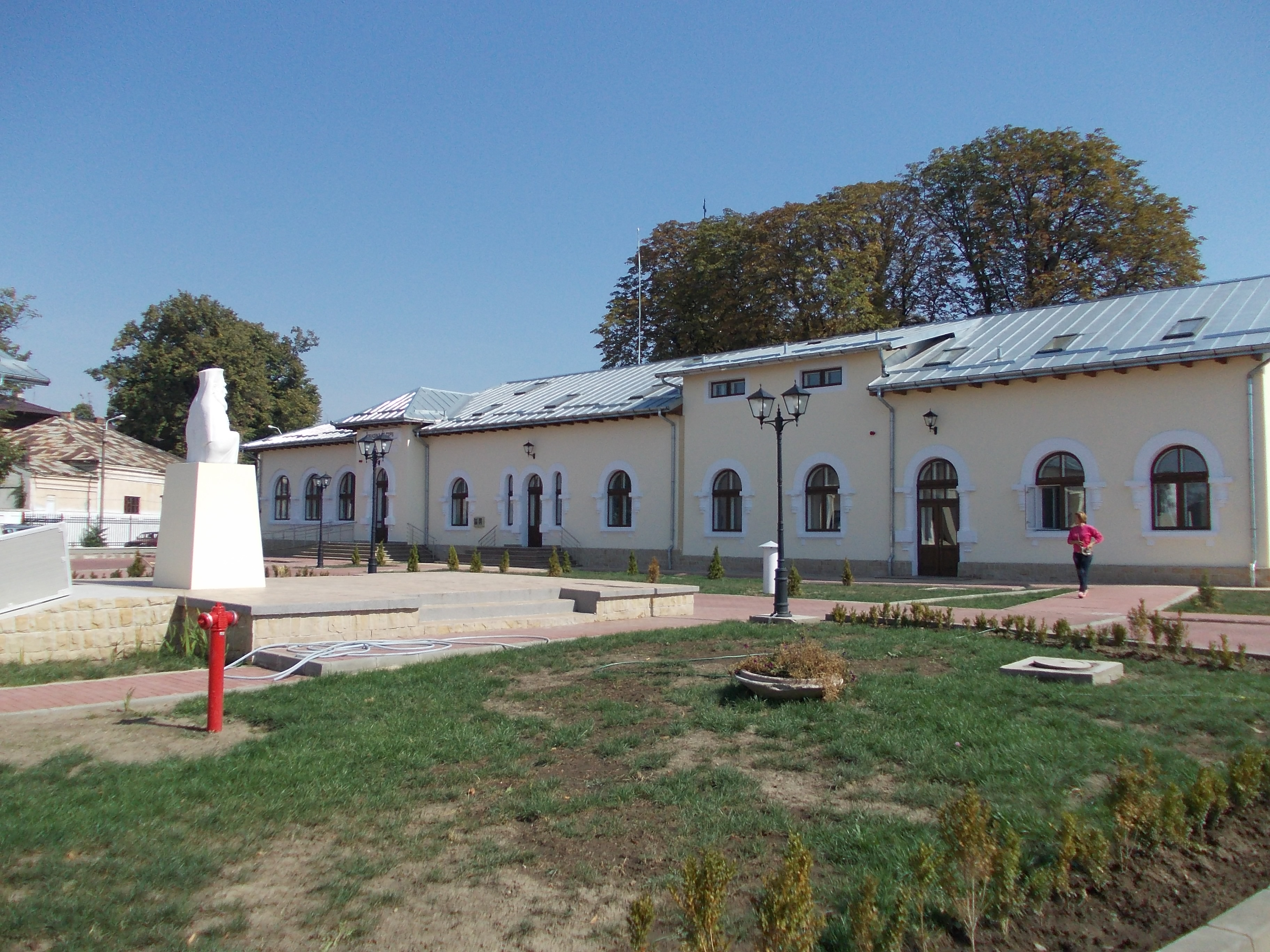 Ansamblul Fundației "Melchisedec"